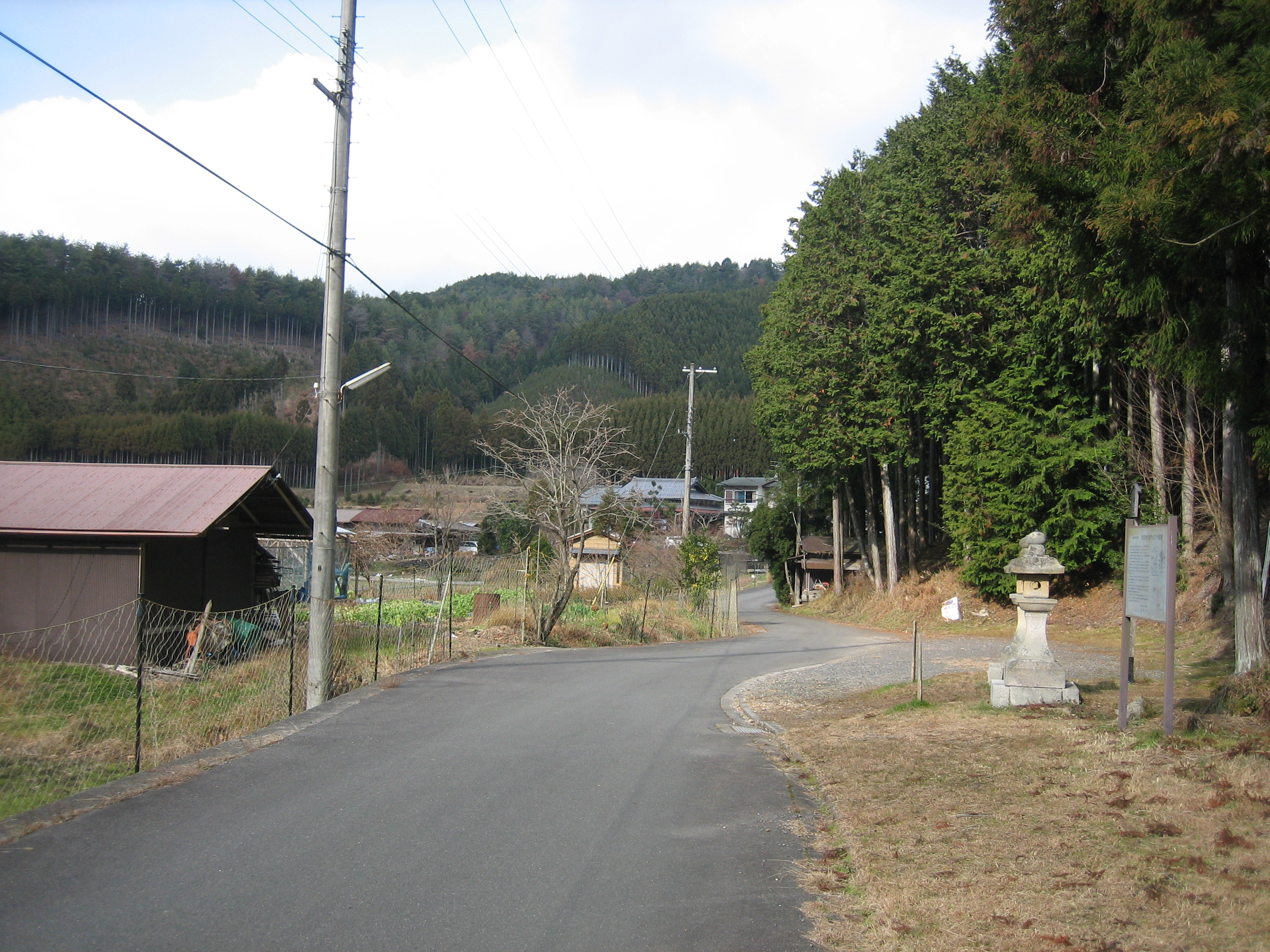 京都市北区西賀茂氷室町地先から撮影